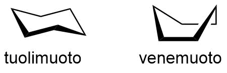 Sykloheksaanin tuoli- ja venemuotoa esittävät konformaatiot